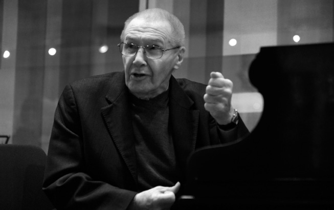 Kurtág György magyar zeneszerző, zongoraművész és kamarazene-tanár.